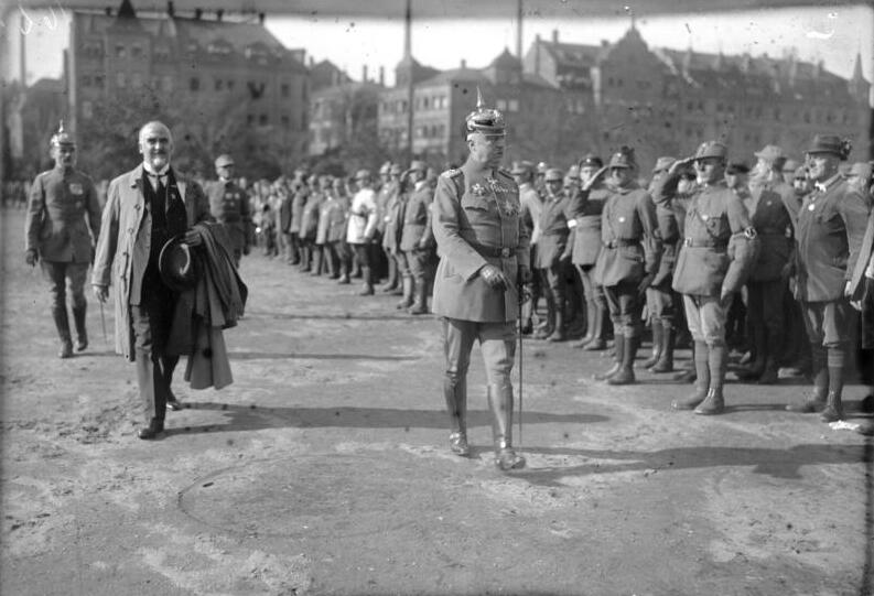 Der Deutsche Tag in Nürnberg zum Andenken an die alte Wehrmacht fand unter riesiger Beteiligung der Nationalsozialisten am 2. September 1923 statt. General v. Ludendorff schreitet die Front der Hakenkreuzler ab.